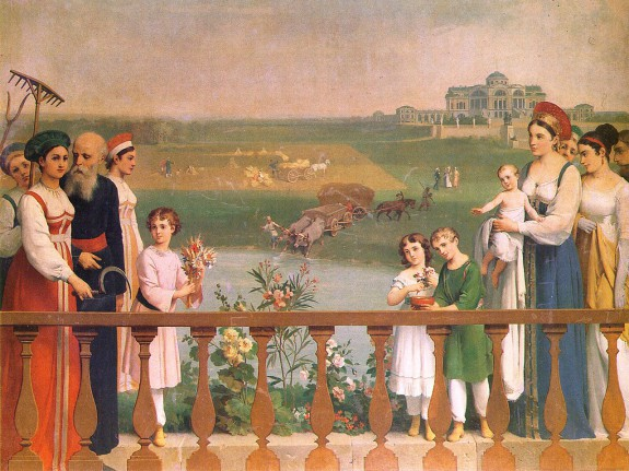 "Дворец в Марьине". 1816 г. Курский областной краеведческий музей.